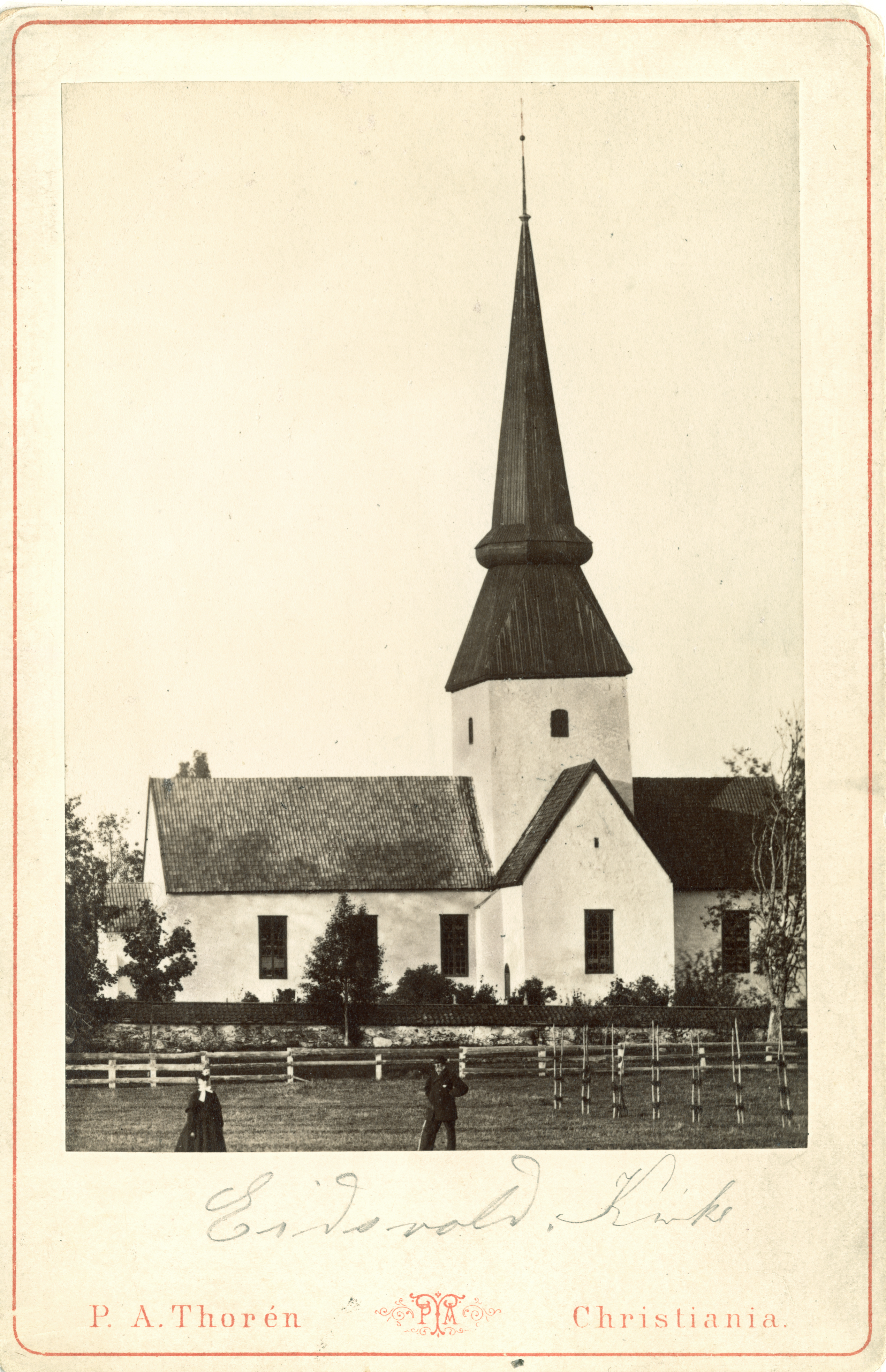 Eidsvoll kirke i Eidsvoll, Akershus